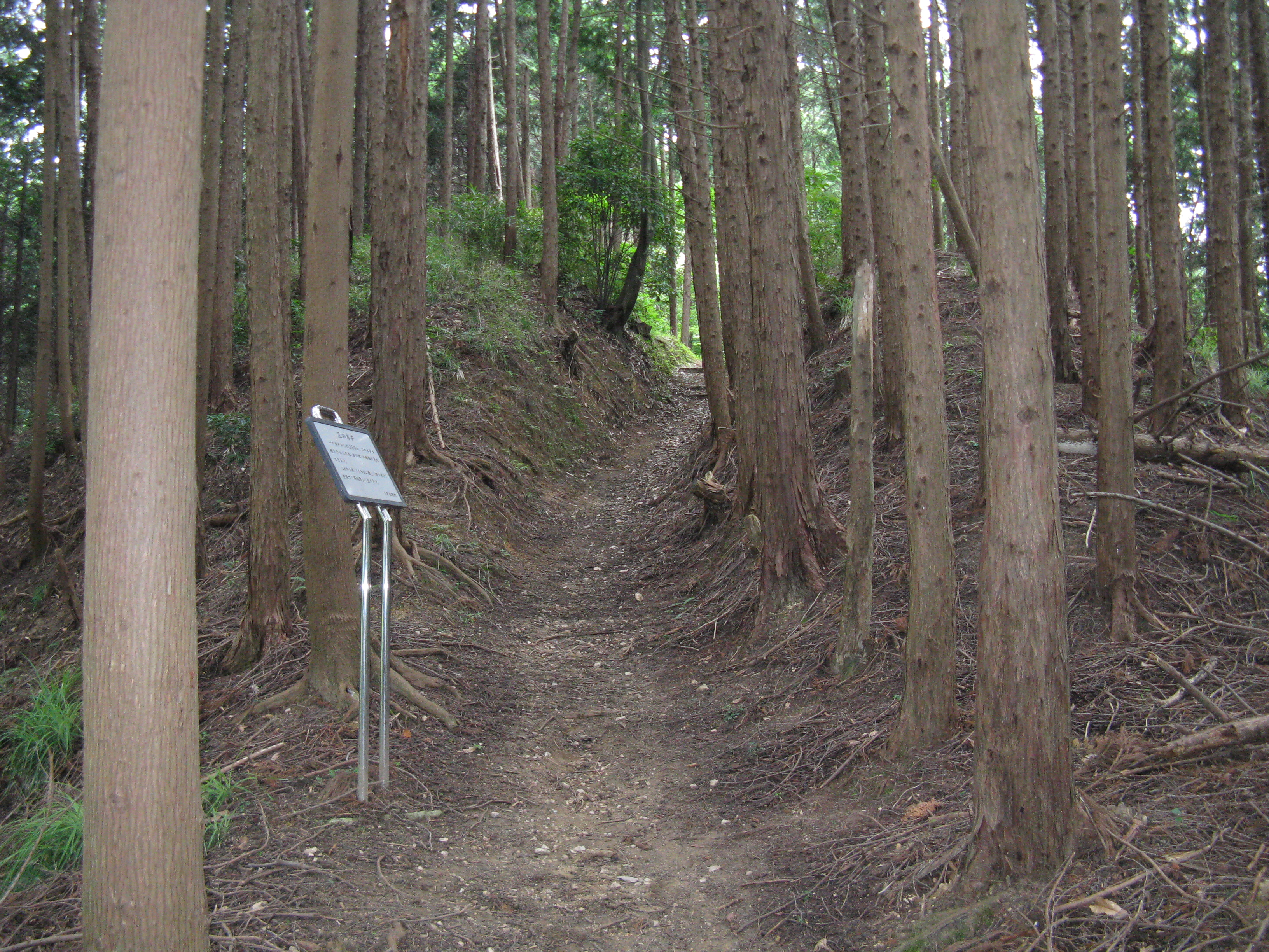 上赤坂城址 三の木戸